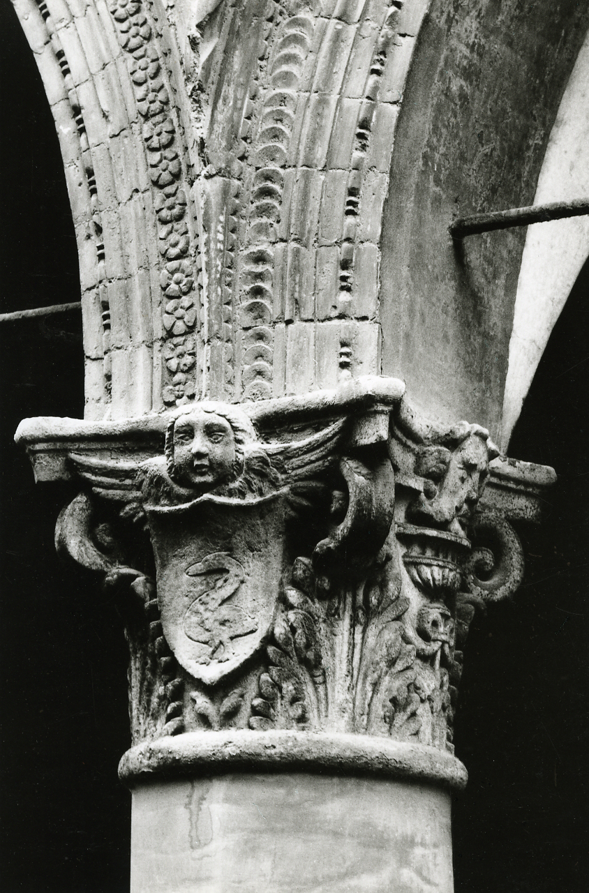 Servizio fotografico : Bologna, 1969 / Paolo Monti. - Stampe: 3 : Positivo b/n, gelatina bromuro d'argento/ carta, 24x30. - ((Al verso delle stampe manoscritti i numeri dei negativi corrispondenti: 810/53, 810/57, 858/13. Sul coperchio della scatola, manoscritto a pennarello: "Archit. Antica". - Occasione: Campagna di rilevamento del centro storico del comune di Bologna. - Fonte: Fattura di Paolo Monti: IV. Commesse/ Fattura (1969/05/09), presso Archivio Paolo Monti. - Fonte: Fattura di Paolo Monti: IV. Commesse/ Fattura (1969/07/31), presso Archivio Paolo Monti